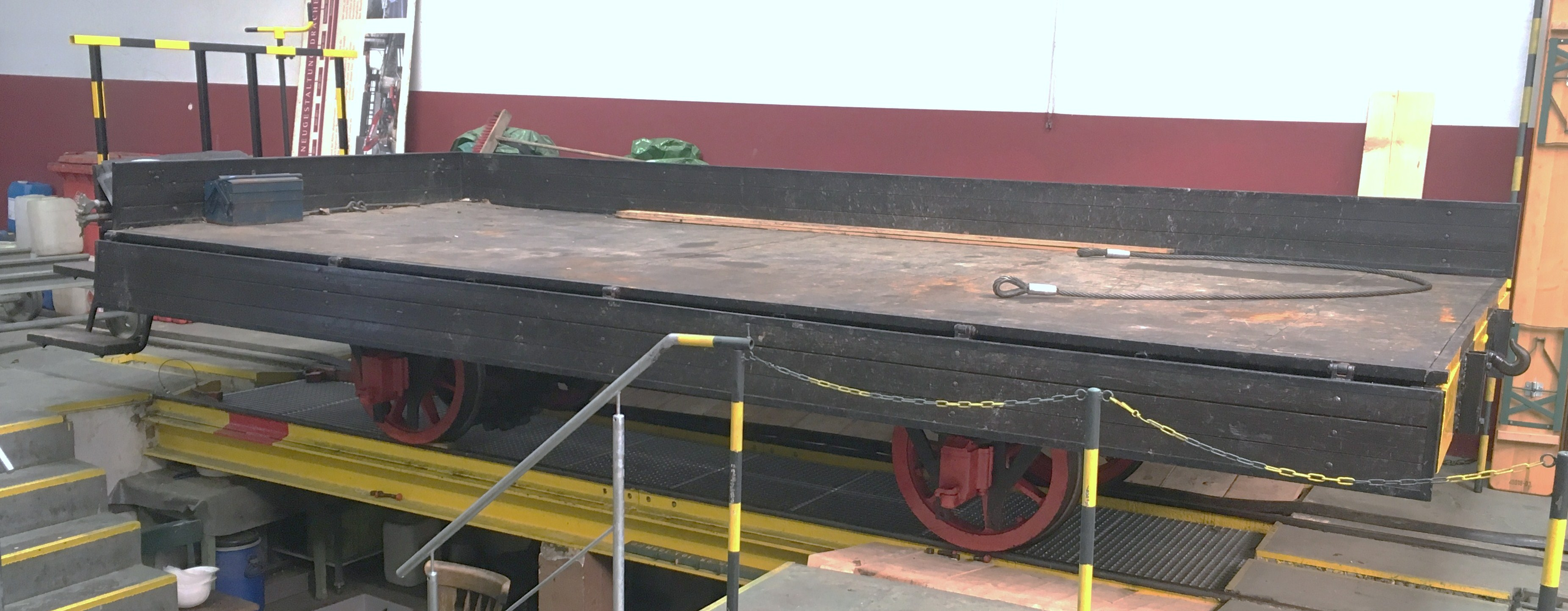 Drachenfelsbahn, Niederbordwagen (1), 1883, zwischen 1883 und 1957 auch bei der Petersbergbahn i. E. (2018)